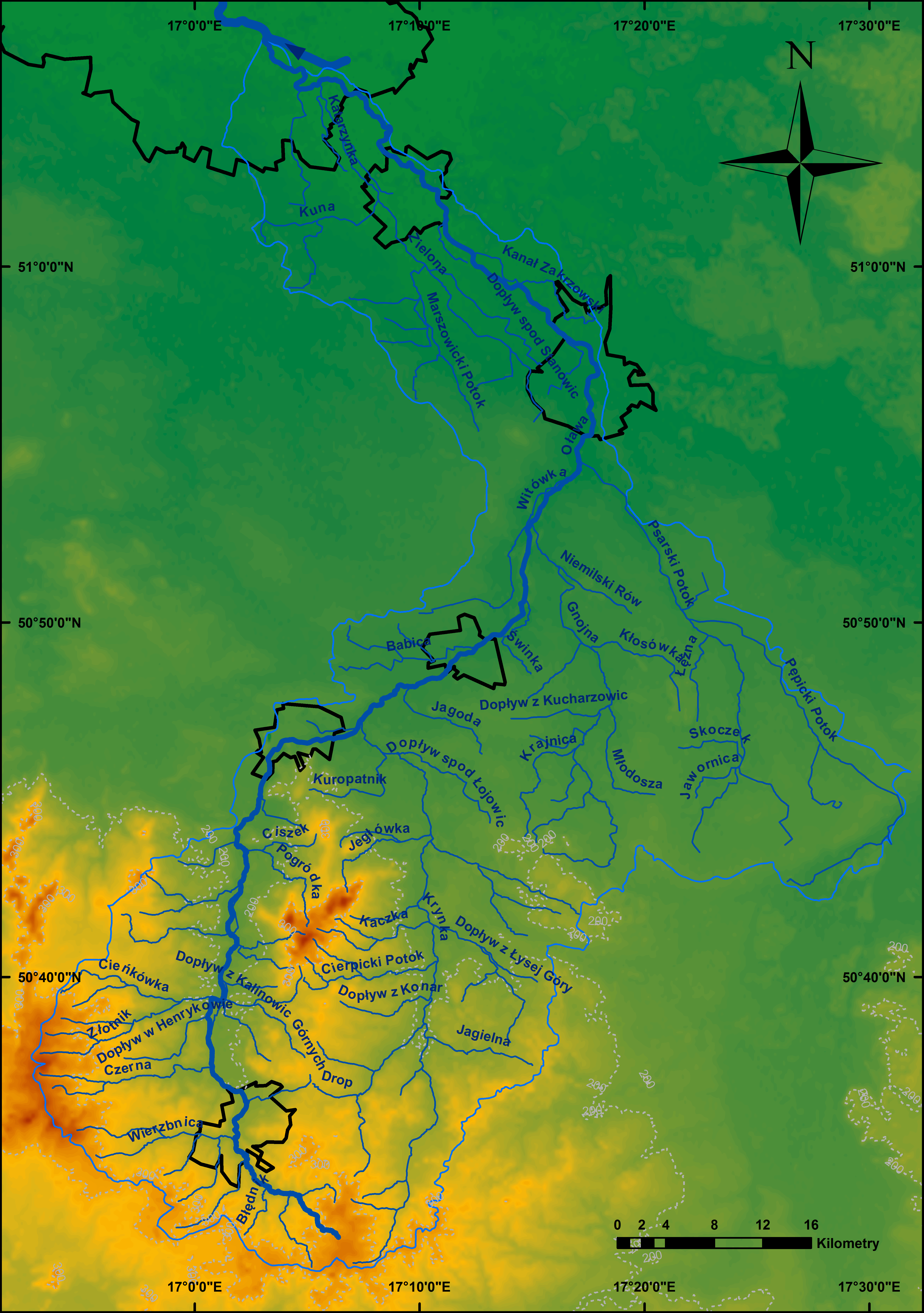 Dorzecze Oławy; rzeka Oława = pogrubiona niebieska linia, jej dopływy = cienkie niebieskie linie, Odra – fragment (recypient) = bardzo gruba niebieska linia z grotem wskazującym kierunek prądu, granica zlewni Oławy = jasnoniebieska linia, miasta (w granicach administracyjnych) przez które przepływa Oława (od źródła: Ziębice, Strzelin, Wiązów, Oława, Siechnice, Wrocław) = czarne obrysy, izohipsy = szare obrysy przerywane